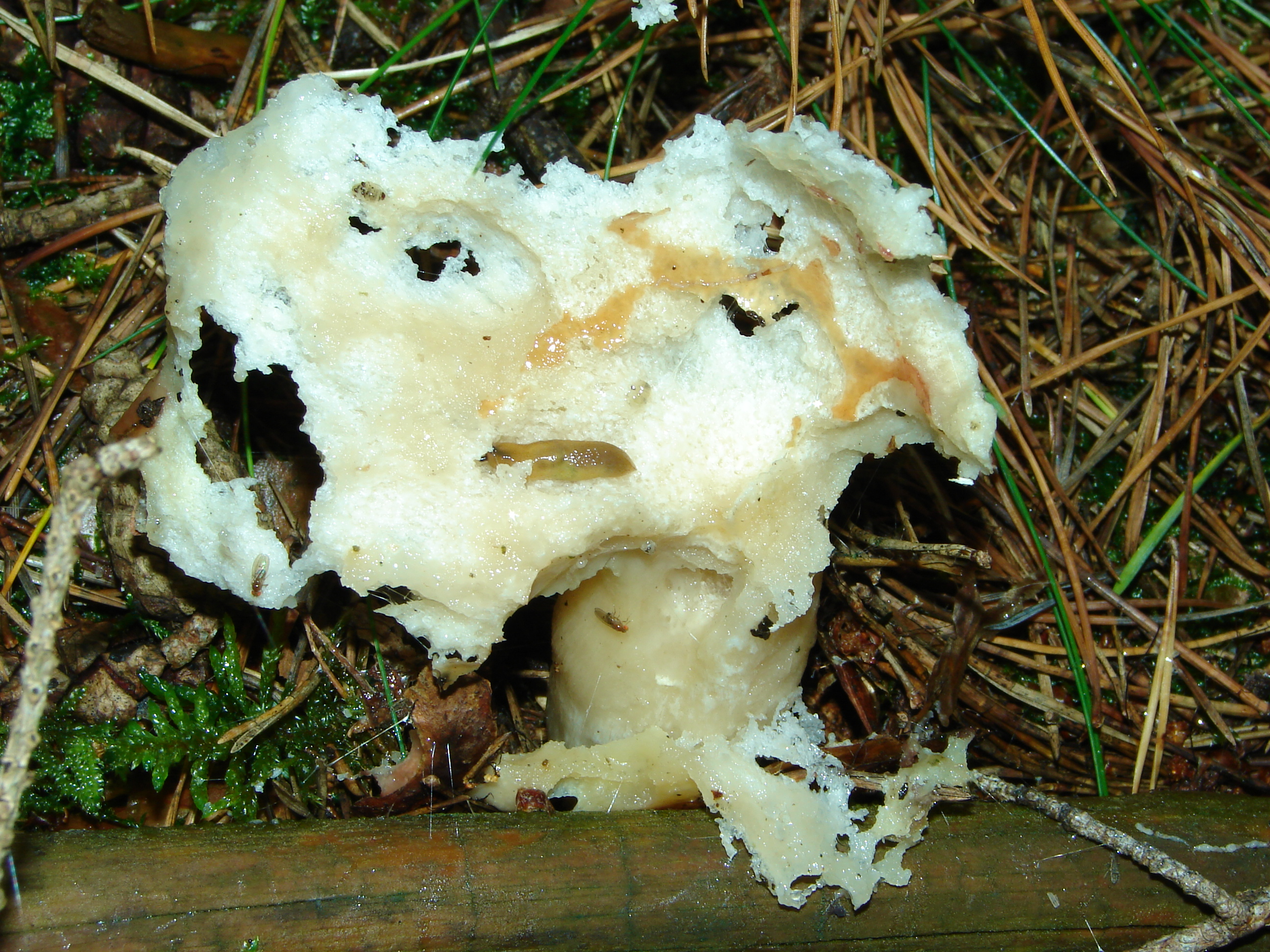 Entstellter Pilz im Wald, der Pilz wurde nicht durch Menschenhand so zugerichtet